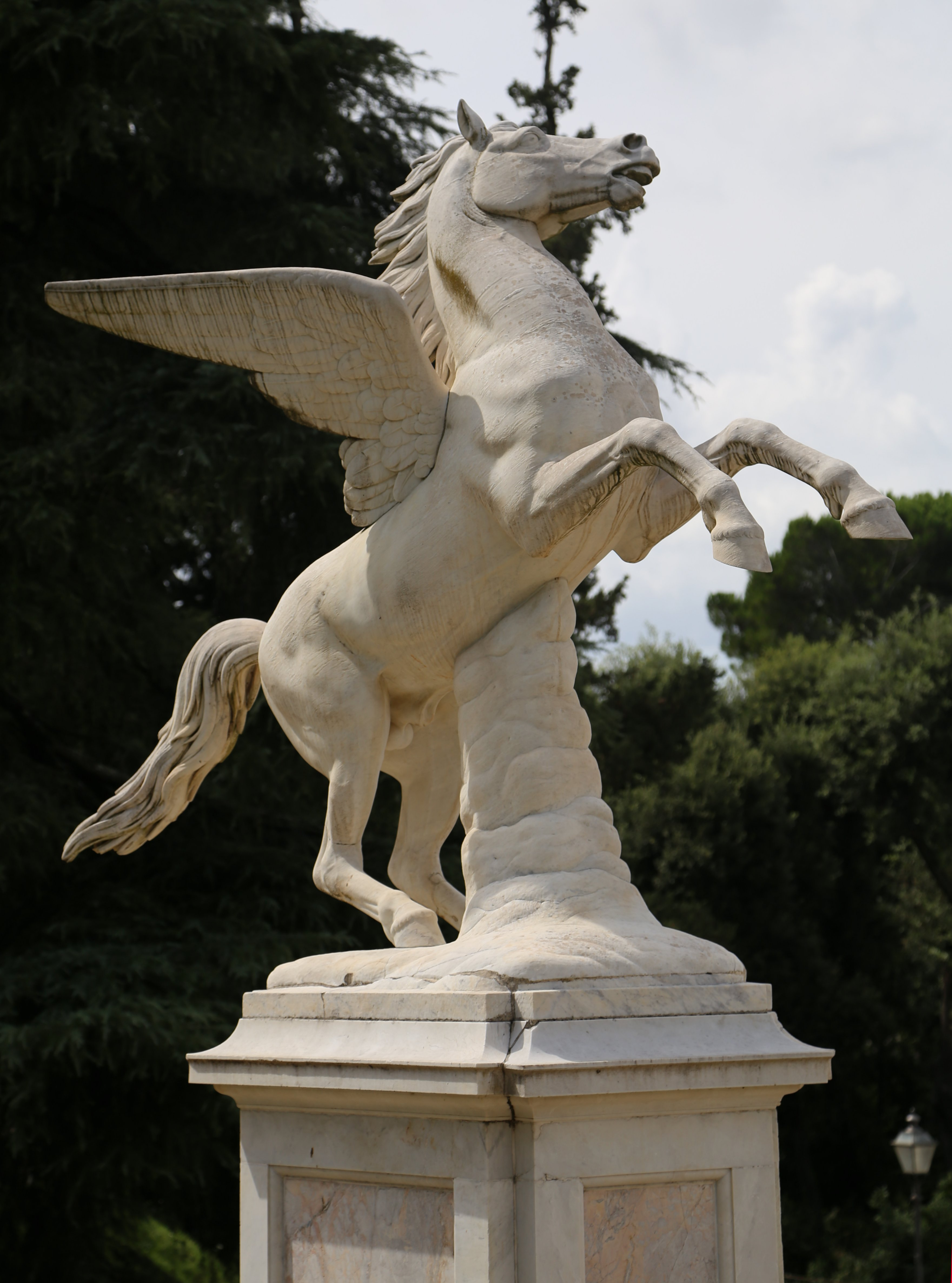 Pegasus-Statue im Boboli-Garten, Florenz